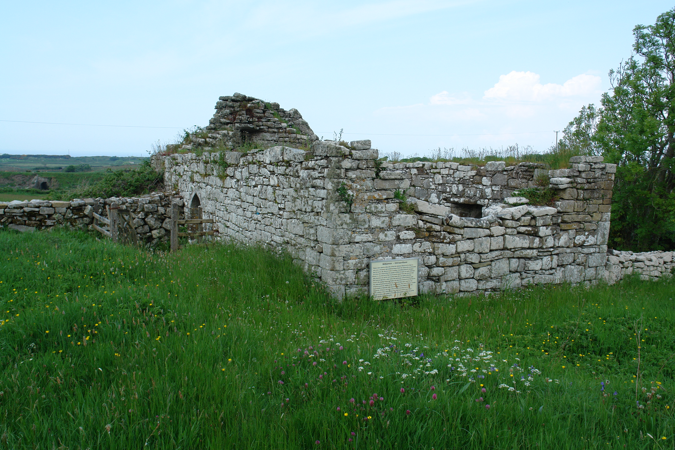 Ruins of church in Kilbarron